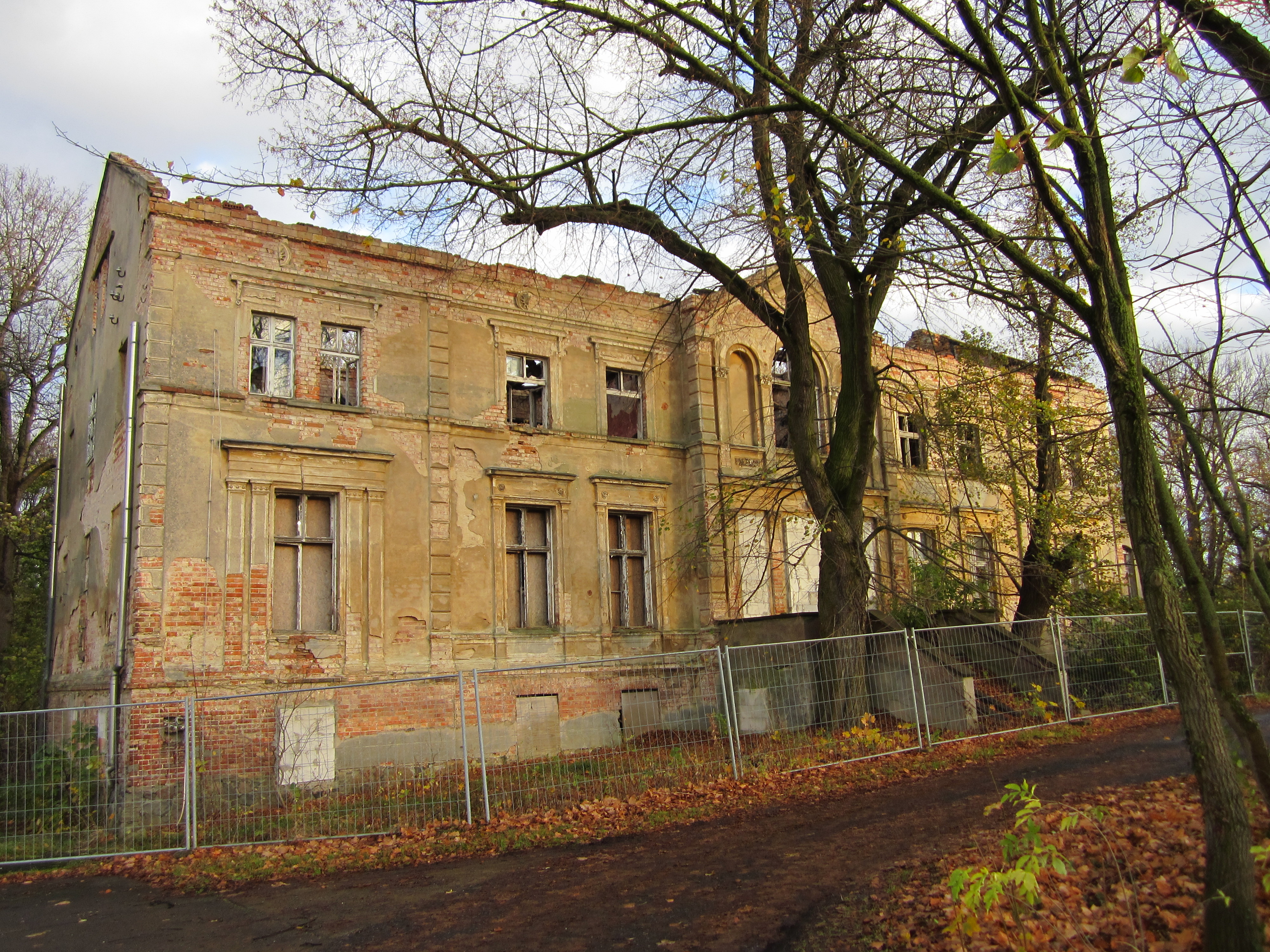 denkmalgeschütztes Gebäude in Kliestow, Berliner Chaussee 76